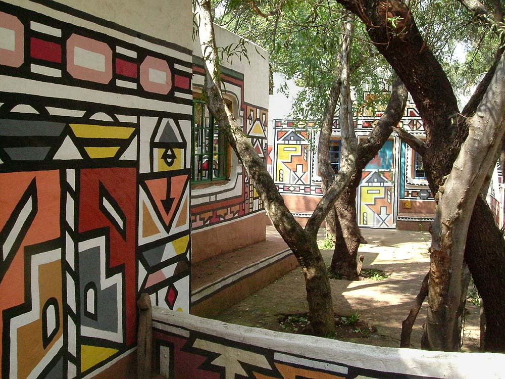 Ndebele falfestés a Lesedi parkban; Dél-afrikai Köztársaság